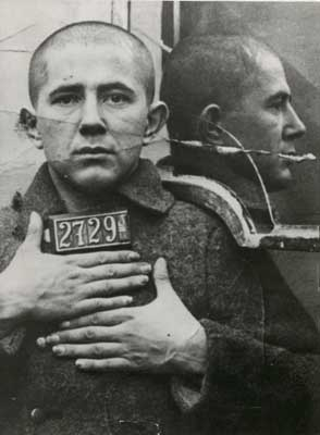 Srpskohrvatski / српскохрватски: Politički osuđenik Milovan Đilas na robiji u Sremskoj Mitrovici 1933. godine.